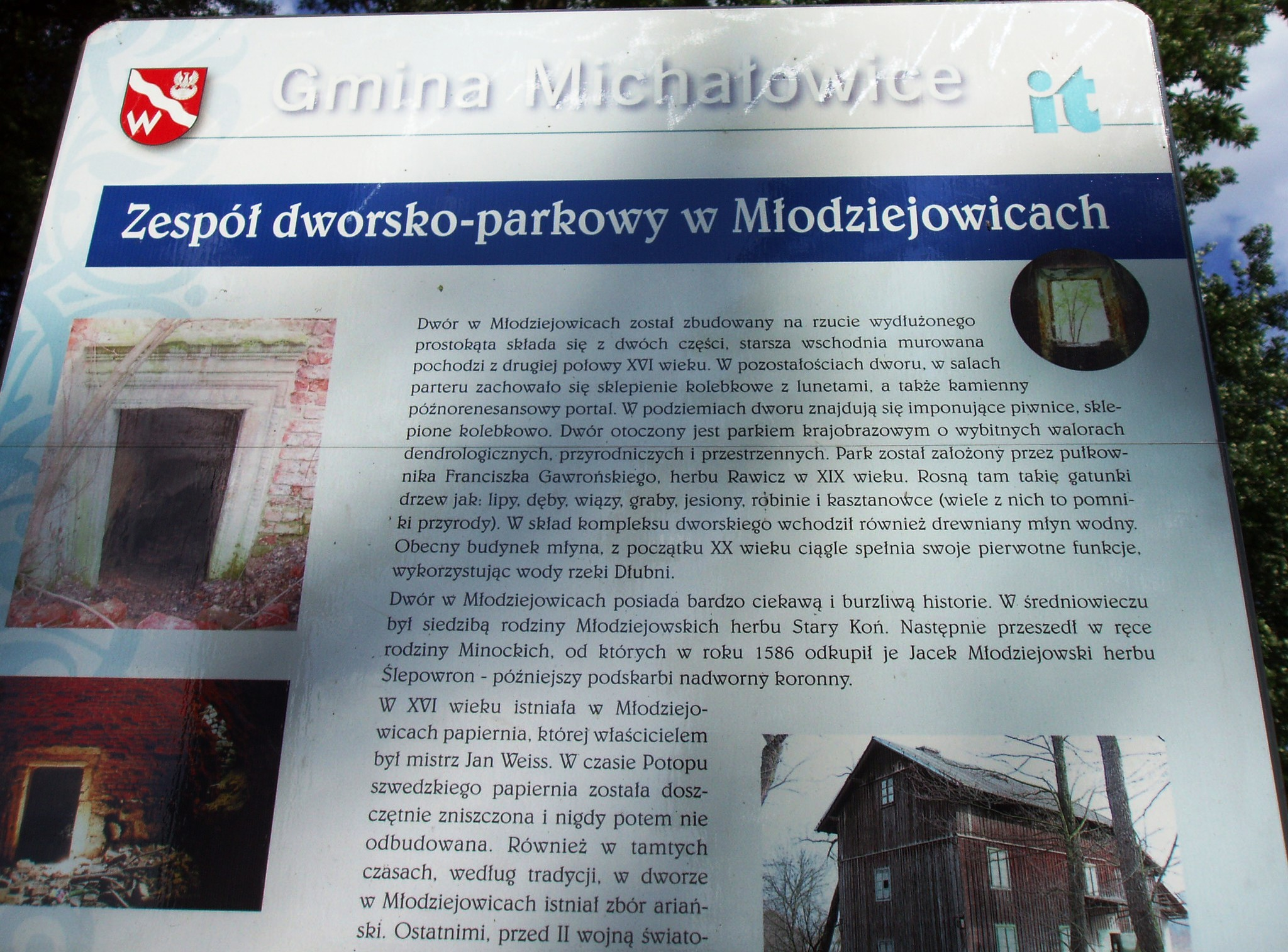 Tablica informacyjna przy zespole dworskim w Młodziejowicach